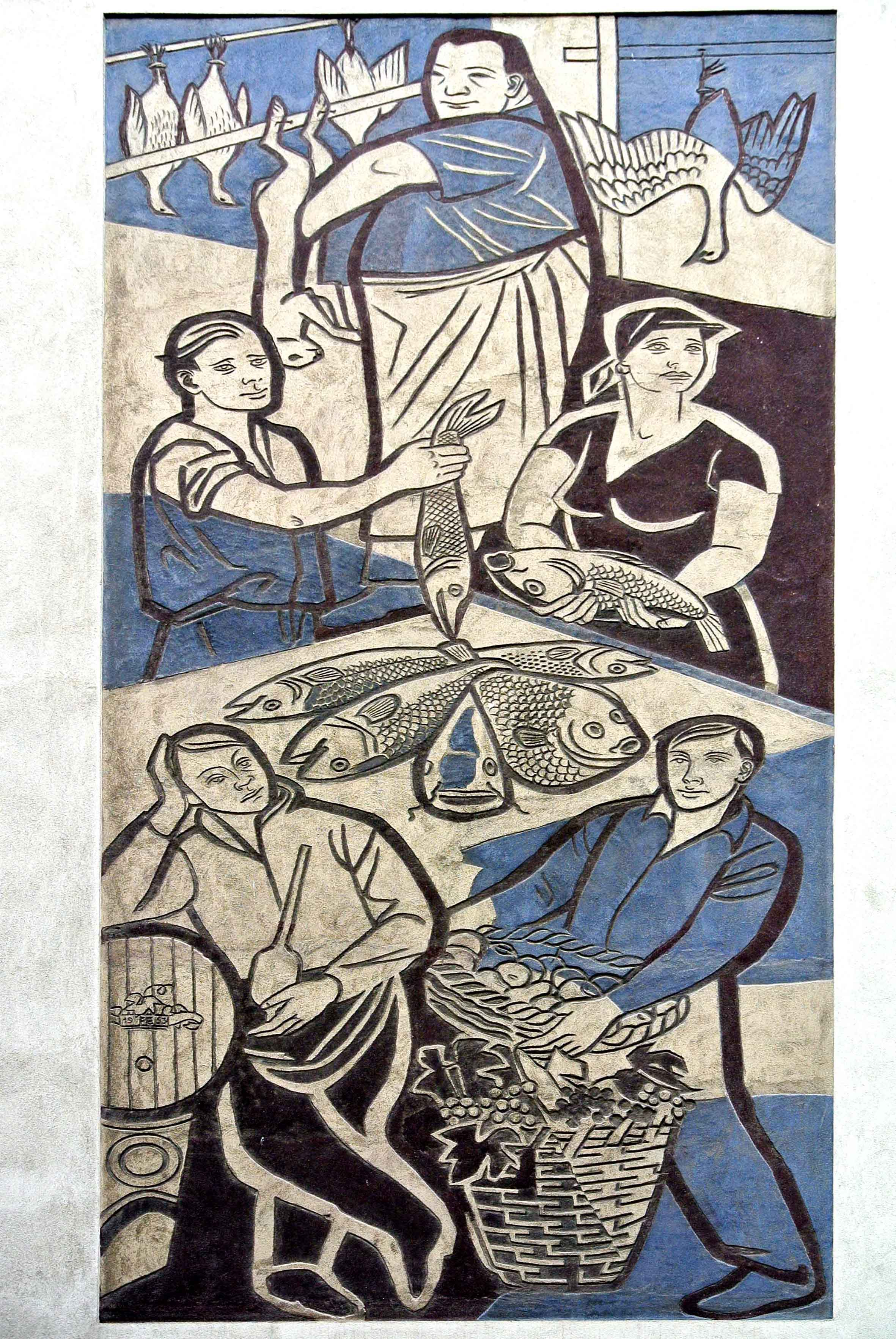 Kunst am Bau in Wien. Sgraffito Versorgung der Stadt (datiert 1953, Franz Elsner), Hohlweggasse Nr.6; 1030 Wien